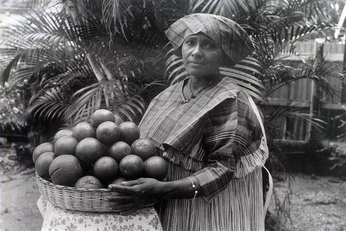 Negatief. Portret van een kotomissie met een mand met citrusvruchten